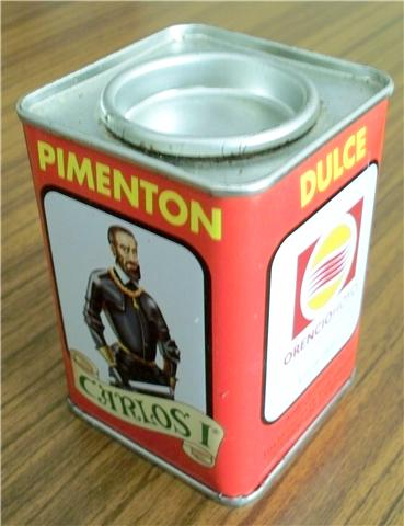 Ladskatolo de papriko uzanta la bildon de la Imperiestro Karlo la 5-a, produktita en la hispana municipo Cuacos de Yuste, kie li mortis